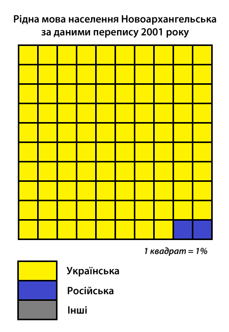 Інфографіка розподілу населення смт Новоархангельськ за рідною мовою згідно з даними перепису 2001 року. Джерело: Розподіл населення Кіровоградської області за рідною мовою (у % до загальної чисельності населення) за переписом 2001 року